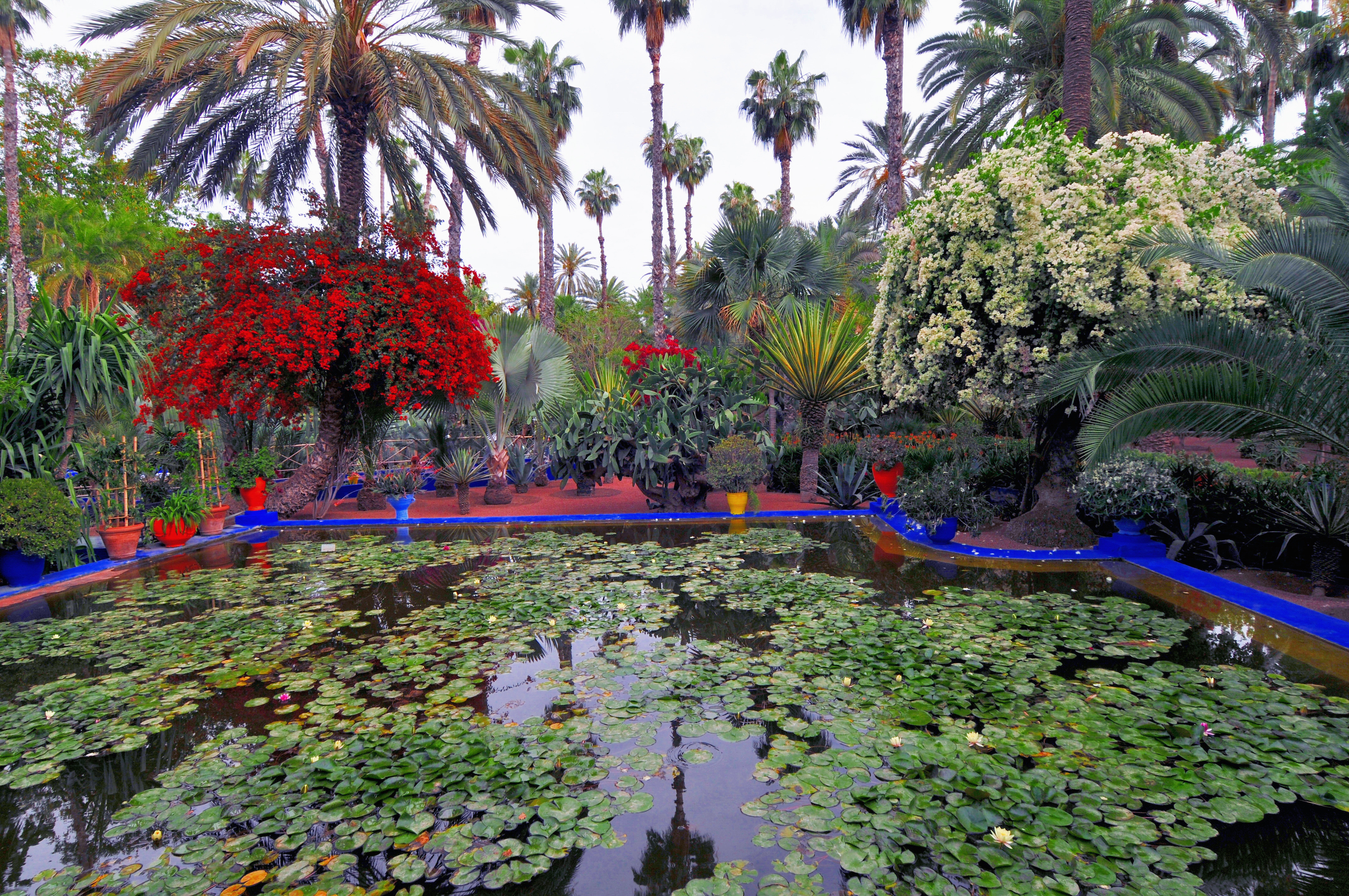 Le Jardin des majorelle 24 04 2010